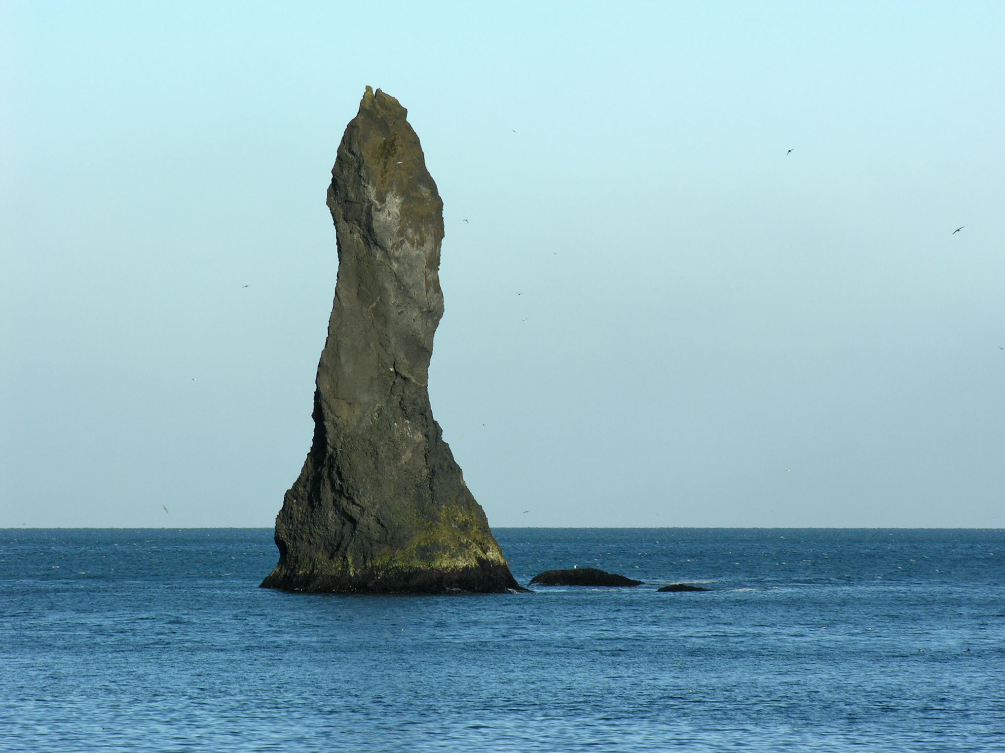 Iceland, Reynir near Vík í Mýrdal